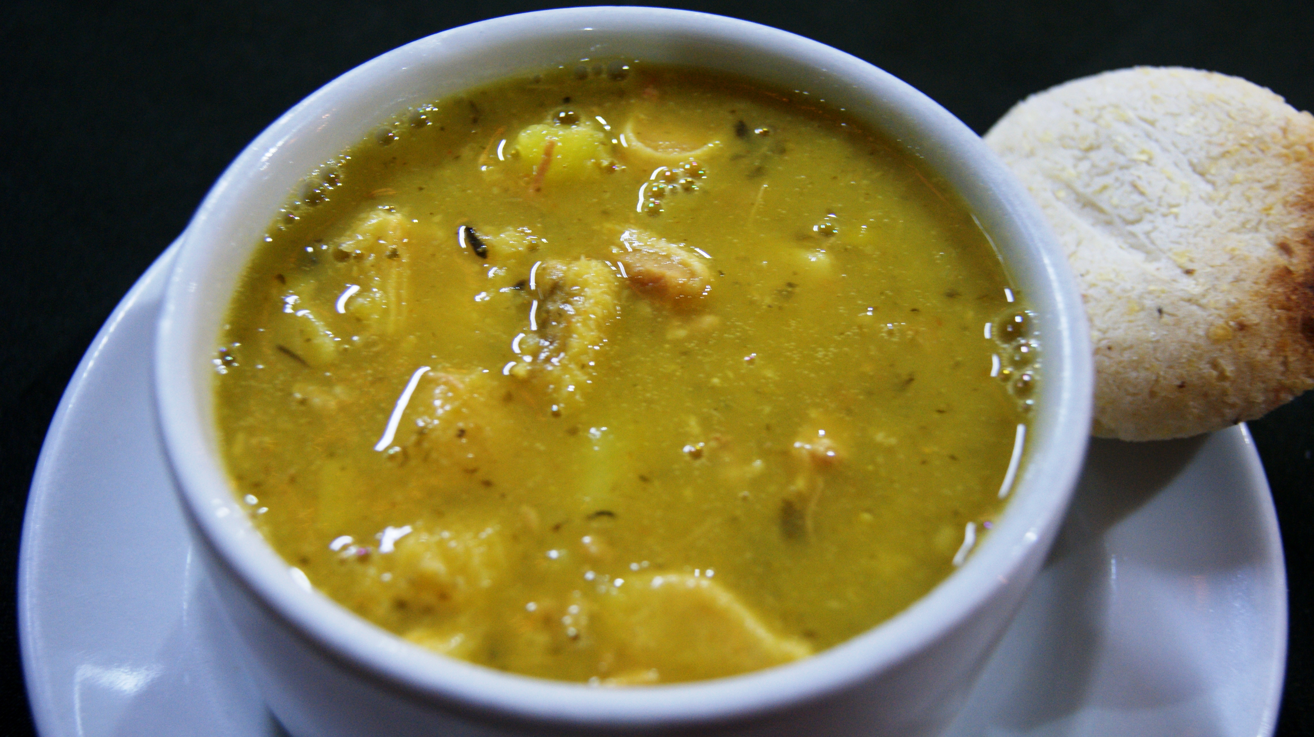 Sopa de mondongo. Restaurante Chócolos, Medellín - Colombia.